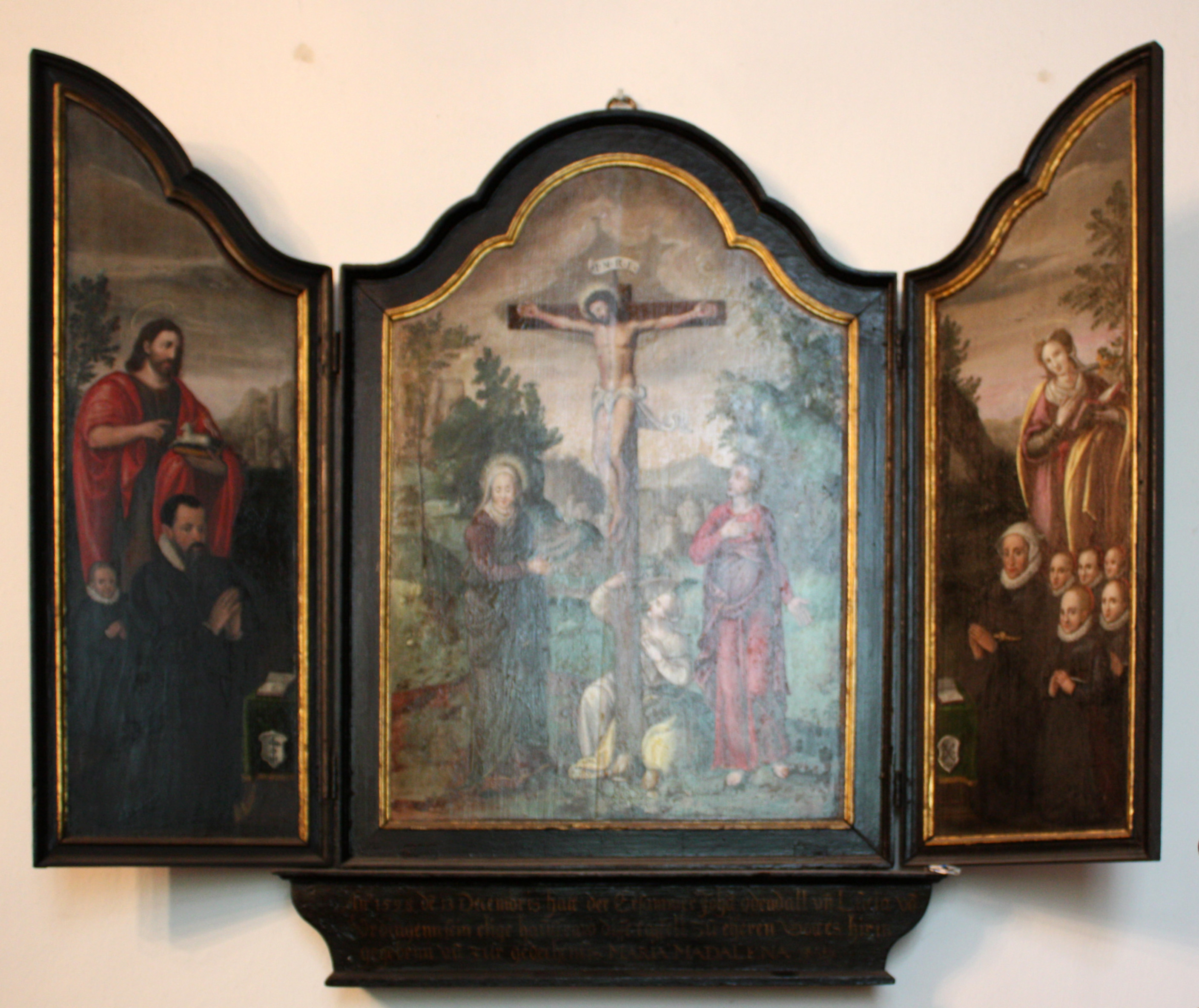 St. Maria Nagdalena Köln. Stifterbild 1593, heute in der Sakristei der Kirche St. Severin Köln